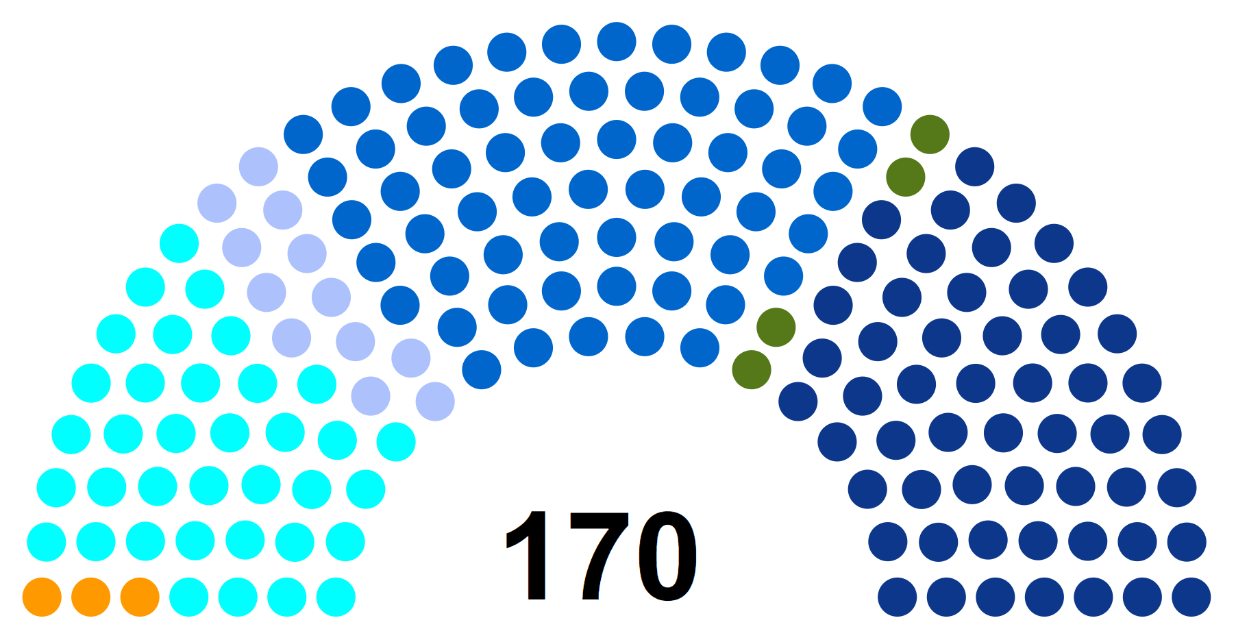 Partis politiques au conseil régional des Hauts-de-France en décembre 2015